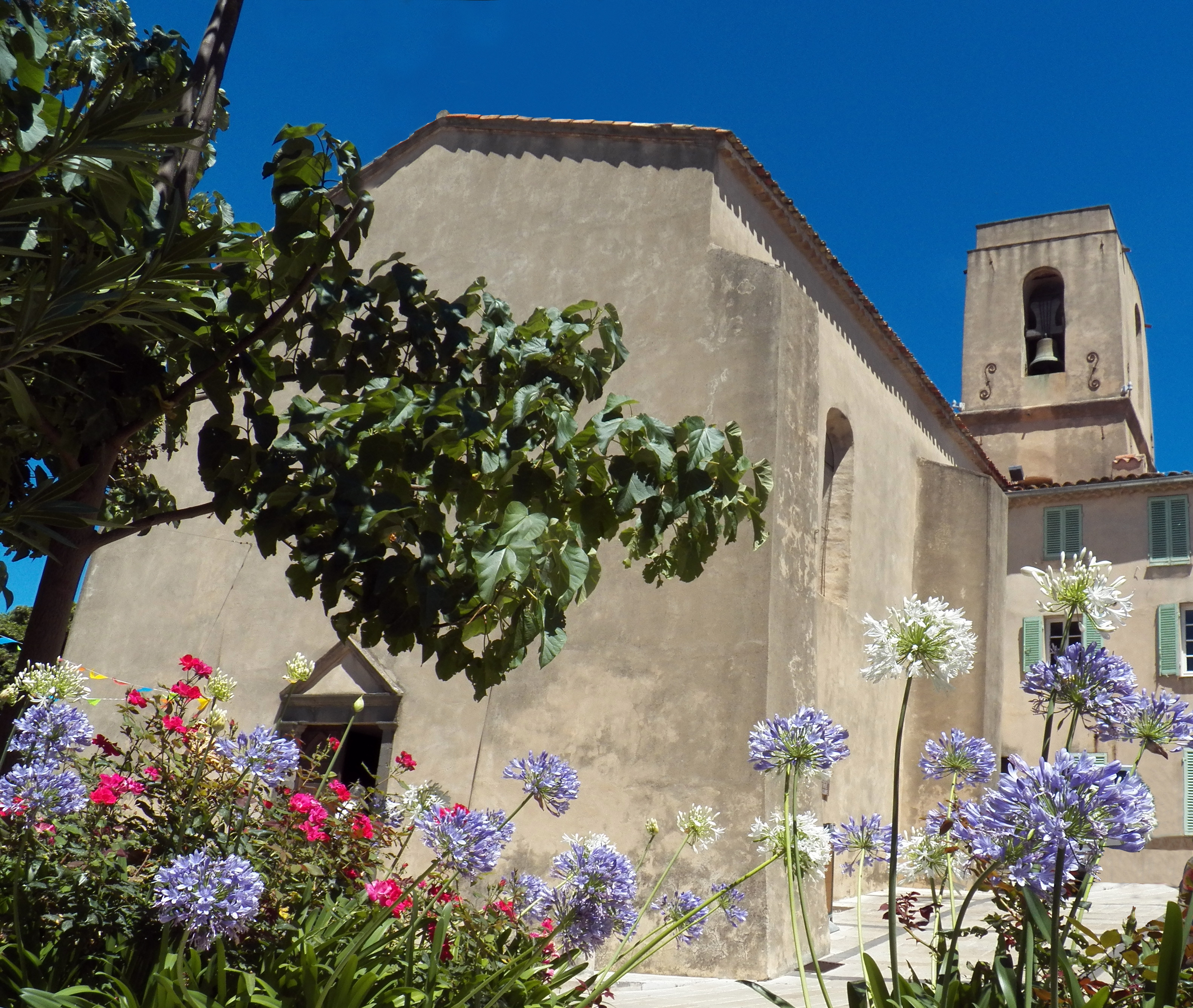 Vue de l'église de Gassin depuis la rue Saint-Laurent